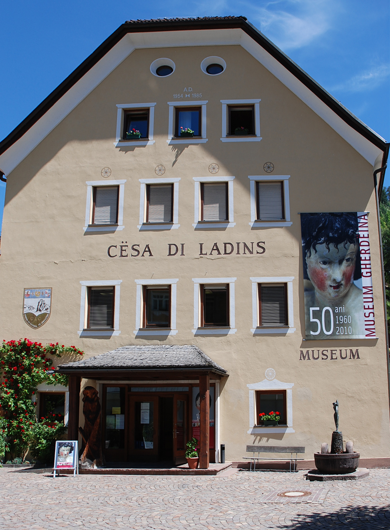 Sitz des Museum Gröden in der Cesa di Ladins in St. Ulrich in Gröden